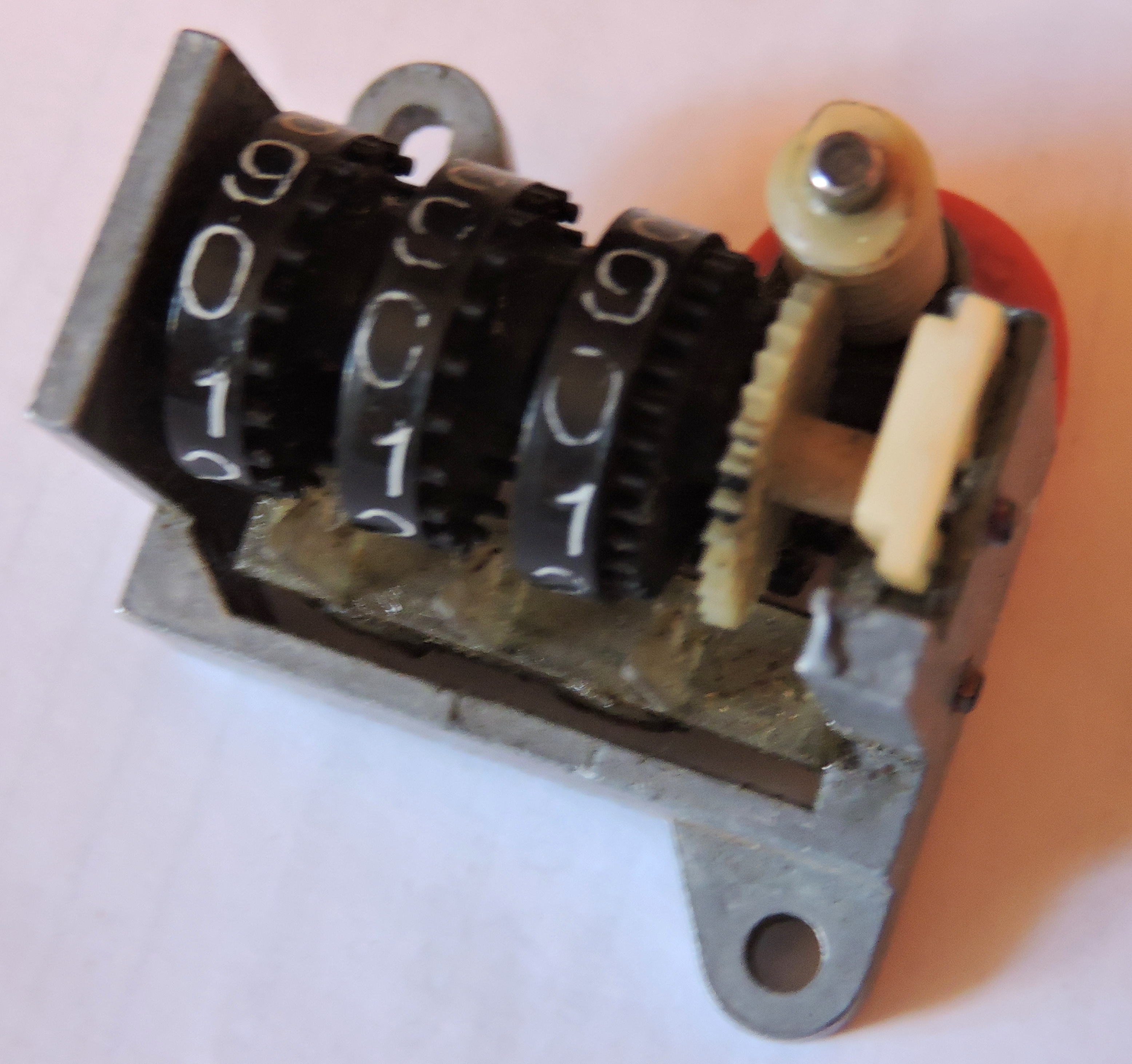 Счётчик от магнитофона